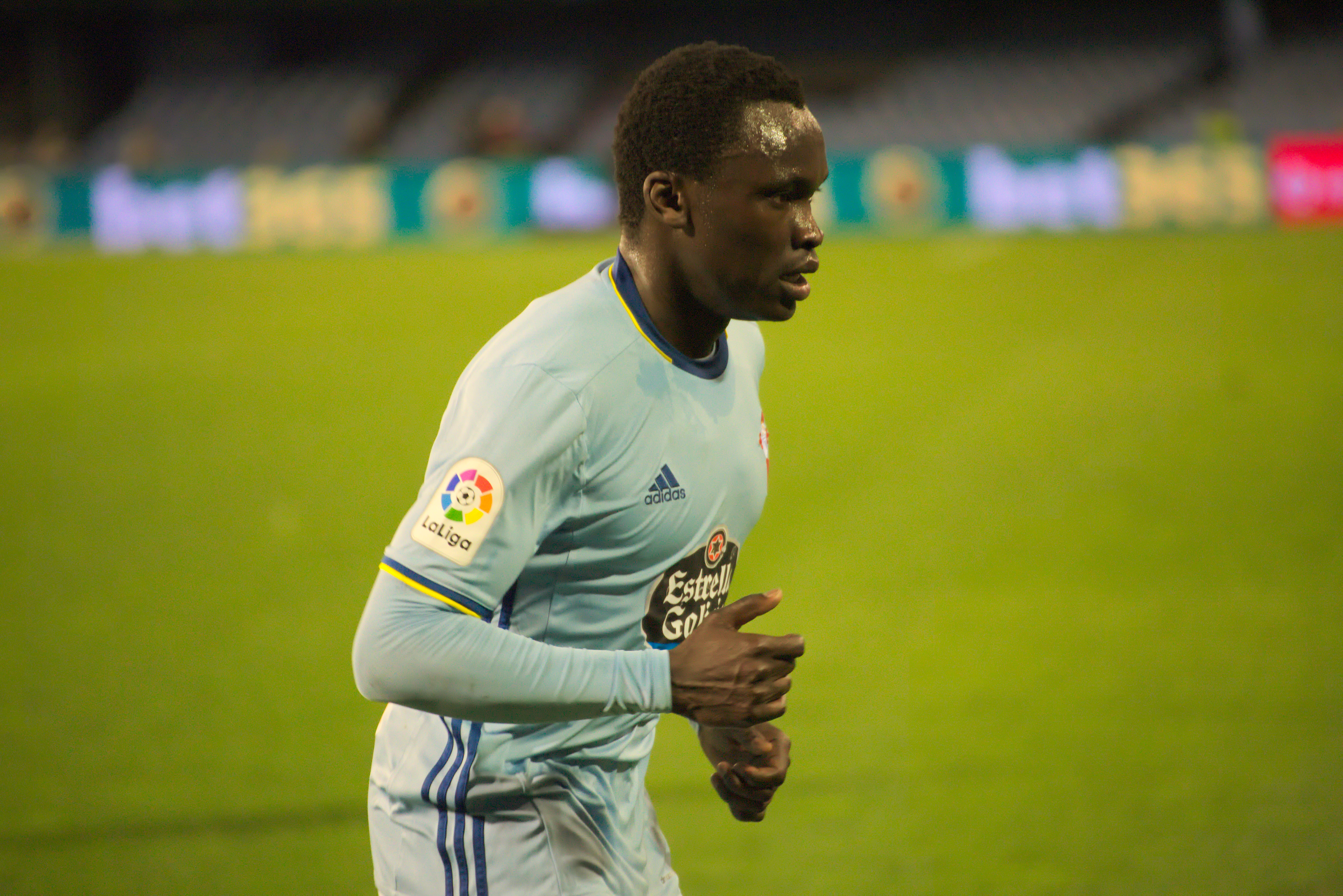 Pione Sisto - RC Celta de Vigo